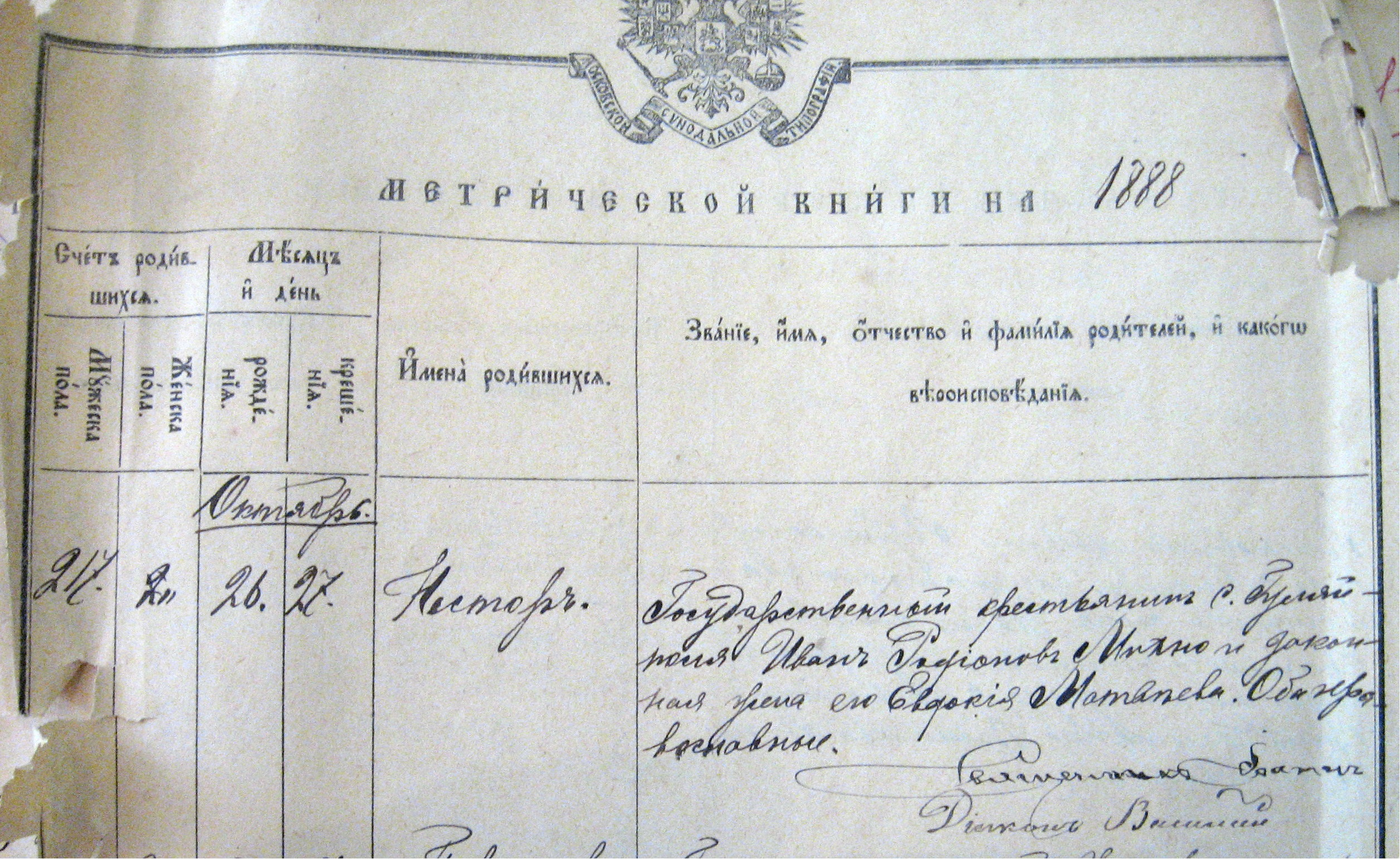 Дата народження Нестора та його батьки